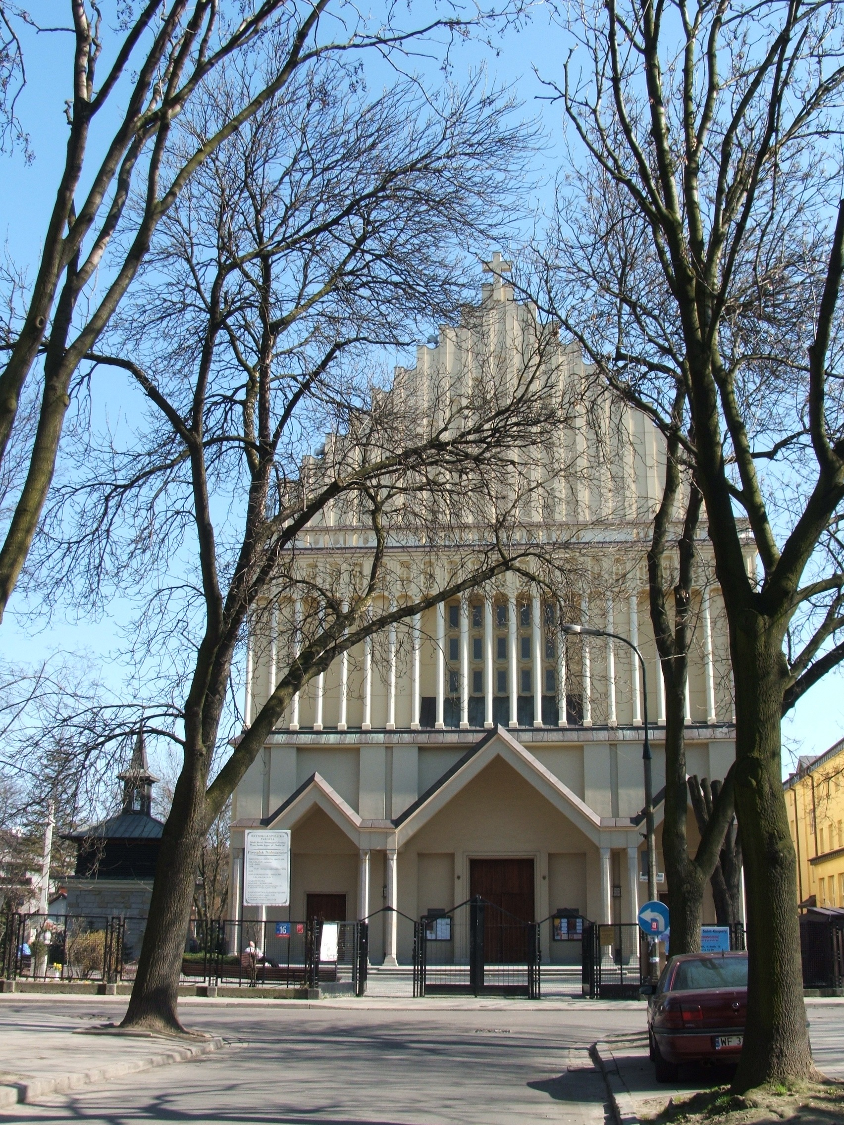 Fasada Kościoła pw. św. Andrzeja Boboli - parafia Matki Bożej Nieustającej Pomocy w Warszawie